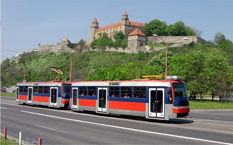 Tatra T3S